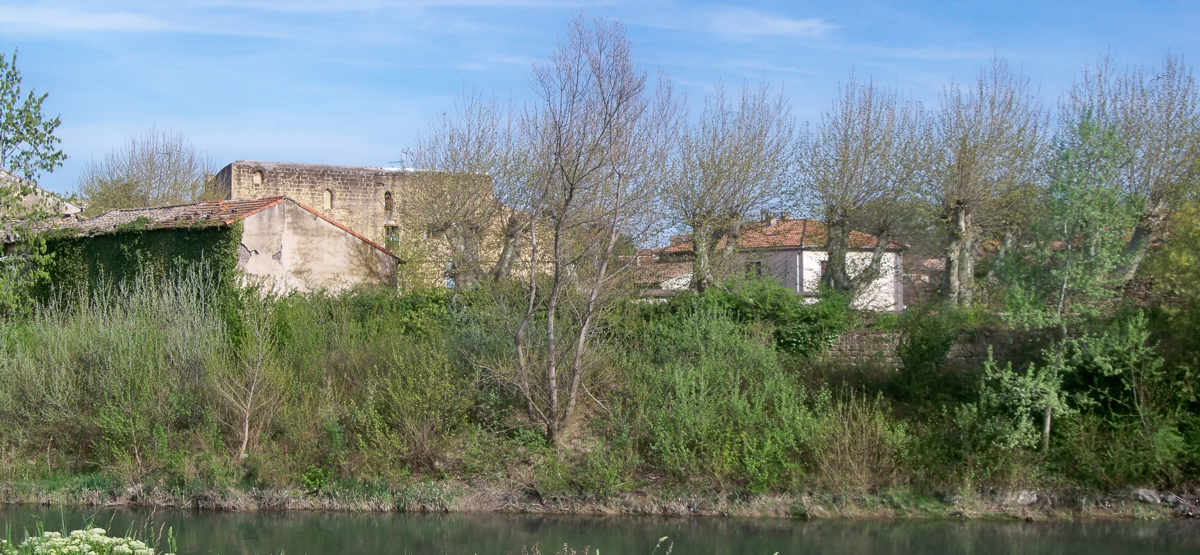 Le palais des papes de Sorgues, vue des bords de l'Ouvèze